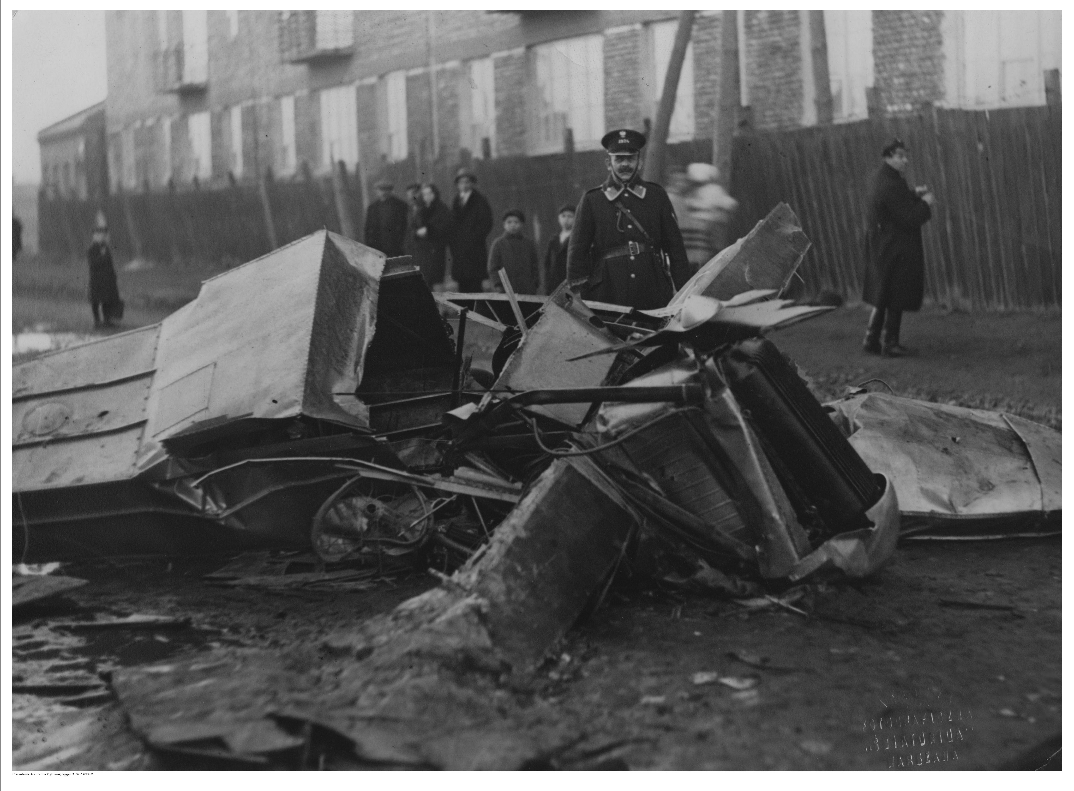 Останките от прототипния самолет-амфибия „PZL.12“, който се разбива във Варшава на 21 март 1931 година. В катастрофата загива неговия конструктор и пилот Зигмунт Пулавски.